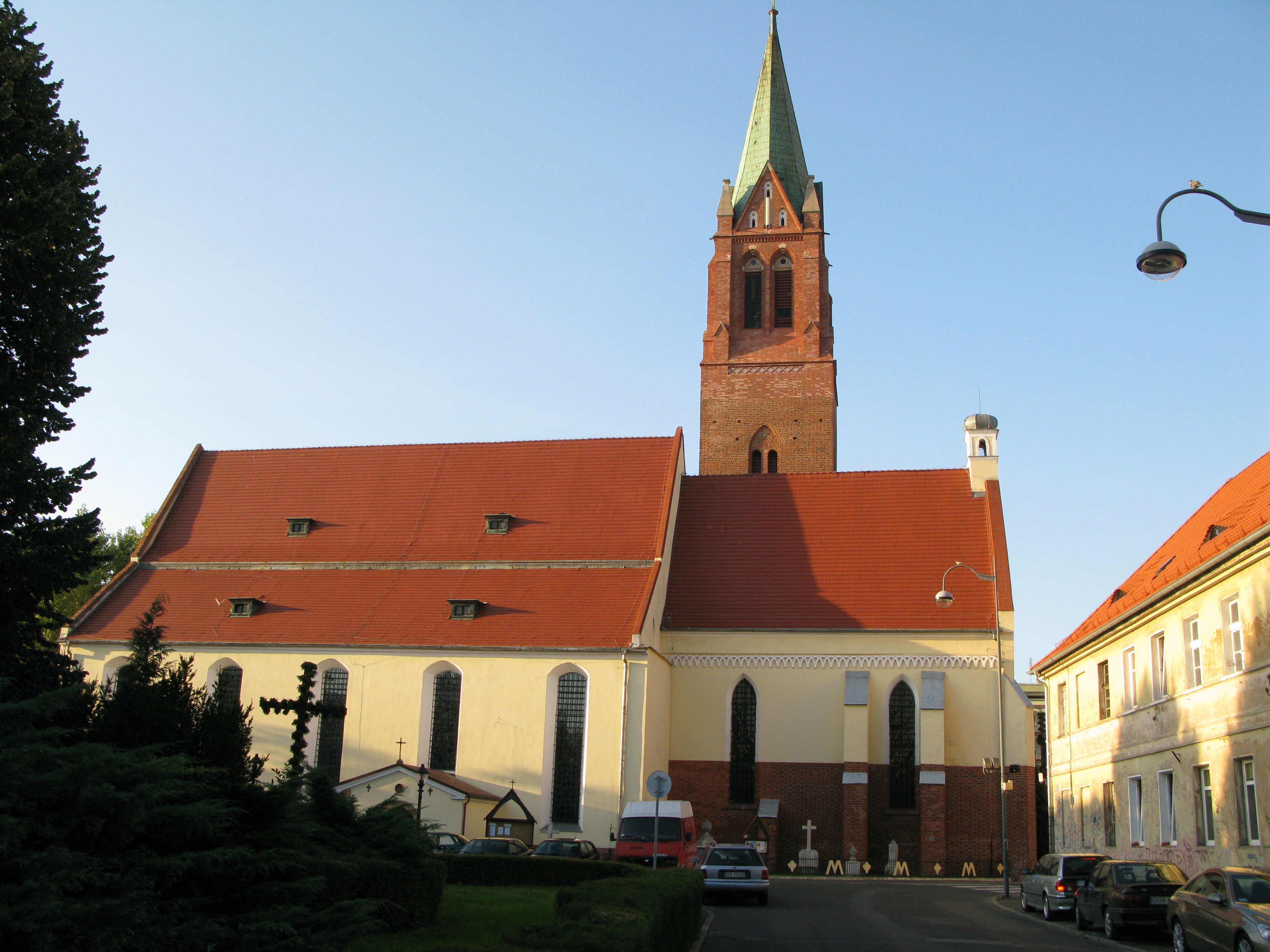 Kościół par. MB Pocieszenia Oława, Pl. M. Kolbe (zabytek 15/A/00)